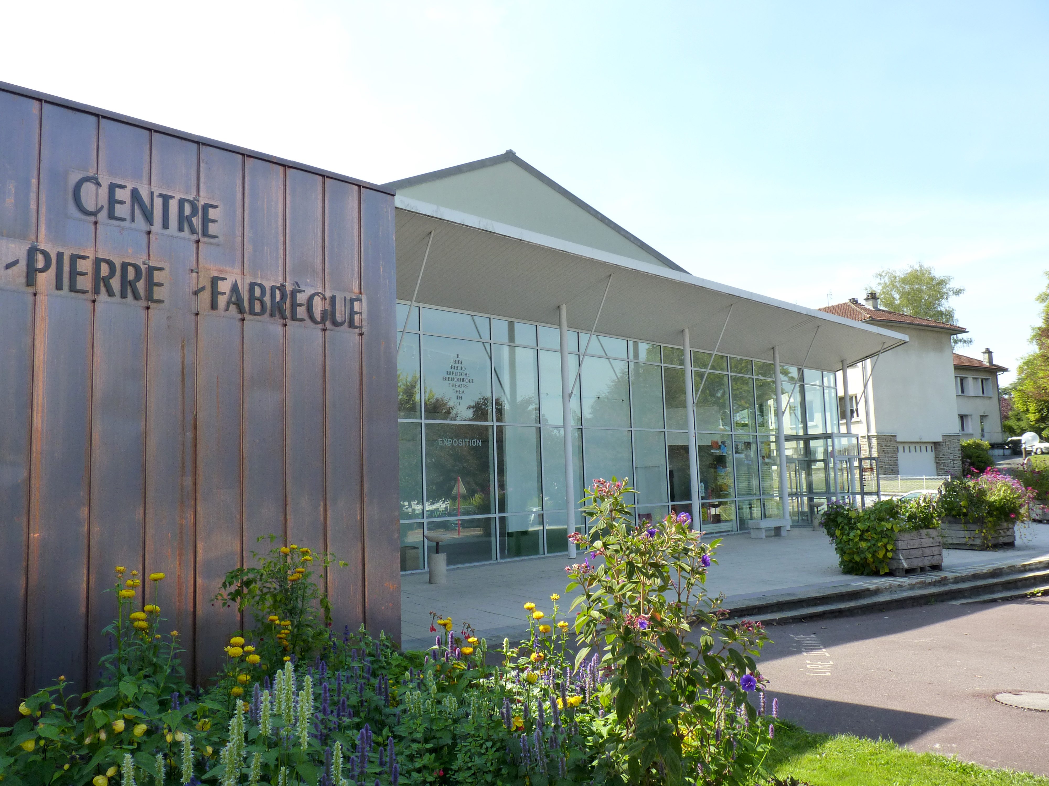 Centre Culturel Jean Pierre Fabregue